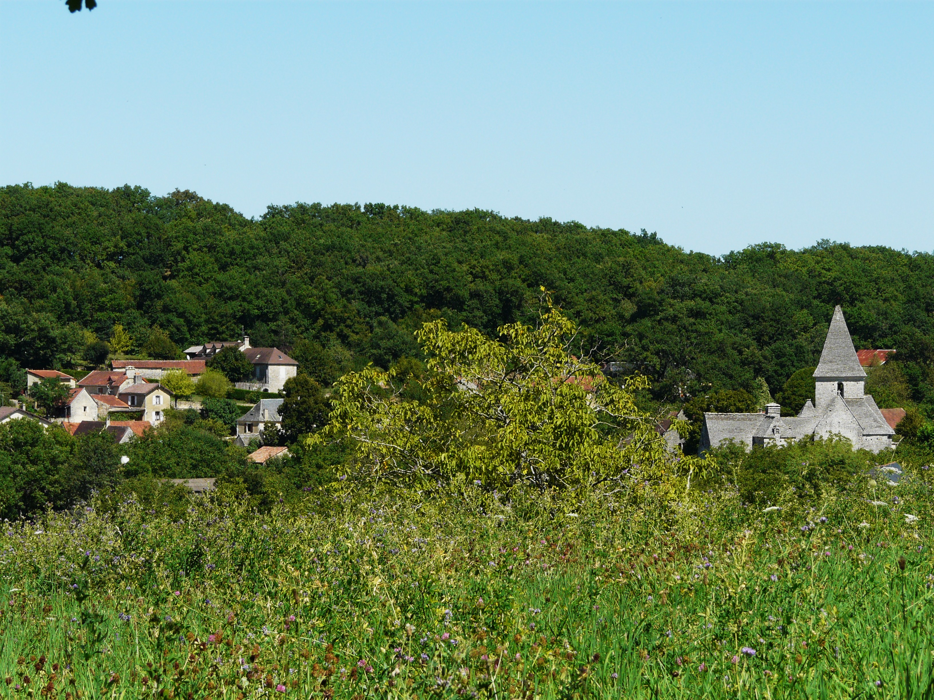 Vue générale de La Cassagne, Dordogne, France